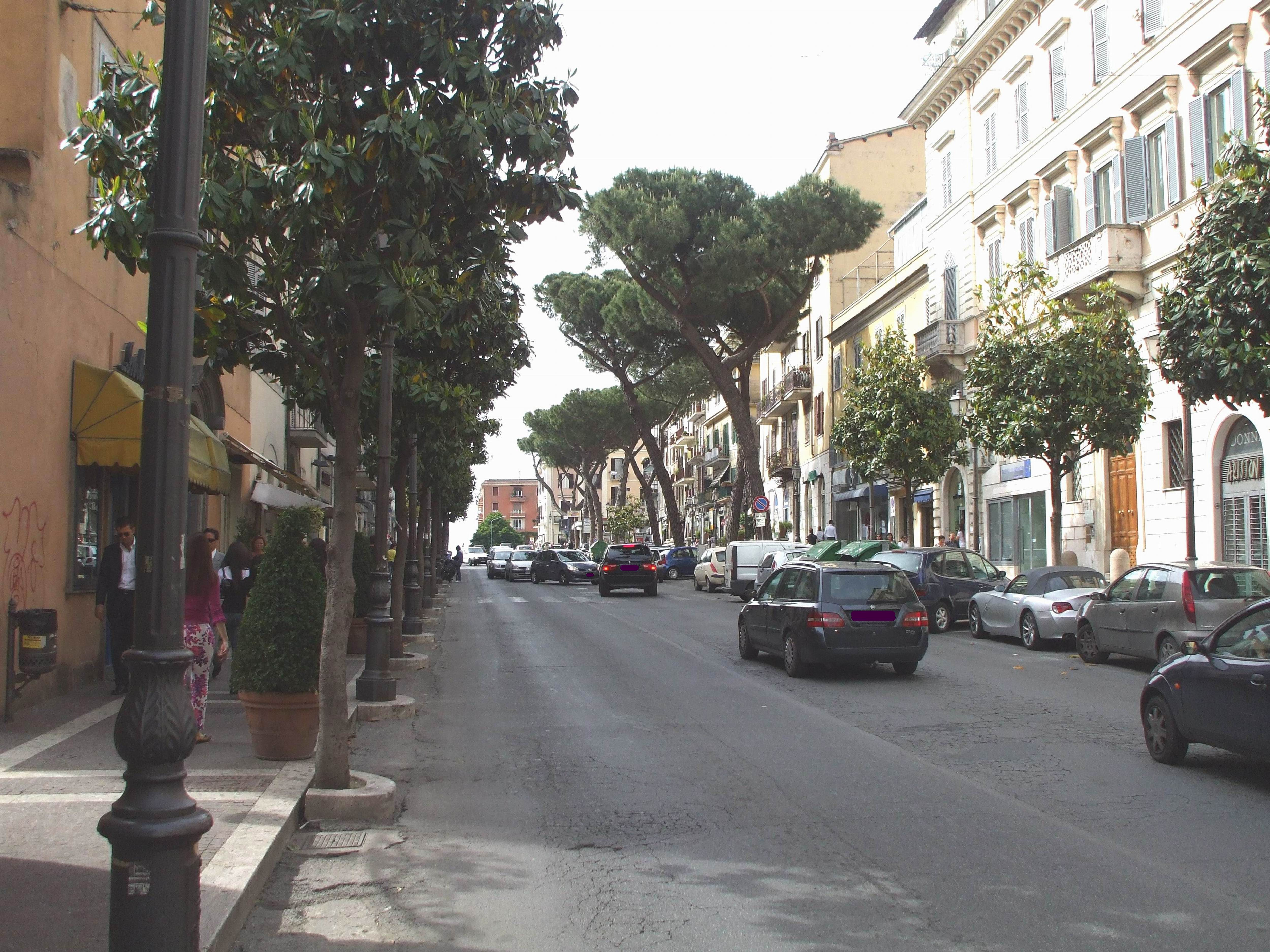 Albano laziale - Corso Matteotti (Corso di sotto)